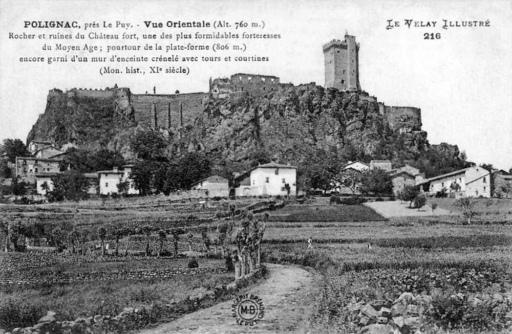 Carte postale montrant le rocher et les ruines du château-fort de Polignac en Haute-Loire (France) / Postcard showing the rock and ruins of the fortified castle of Polignac, Haute-Loire, in France